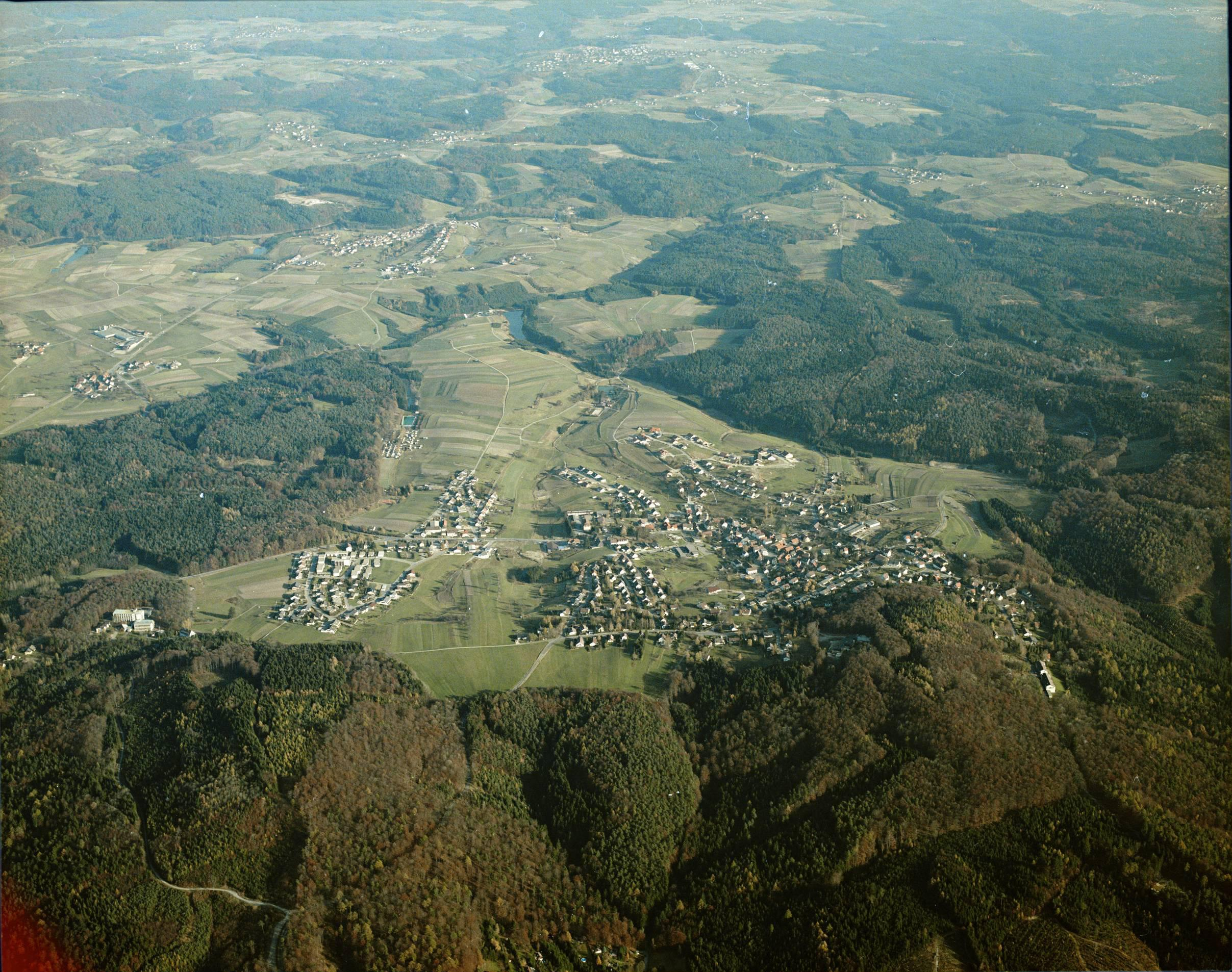 Luftbild von Wüstenrot - Staatsarchiv Sigmaringen - Archivalieneinheit N 1/96 T 1 Nr. 848